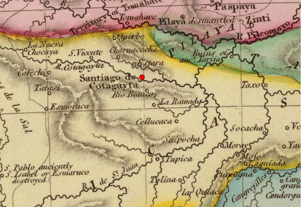 Alto Perú, Santiago de Cotagaita. Detalle de un mapa de las Provincias Unidas en 1812.